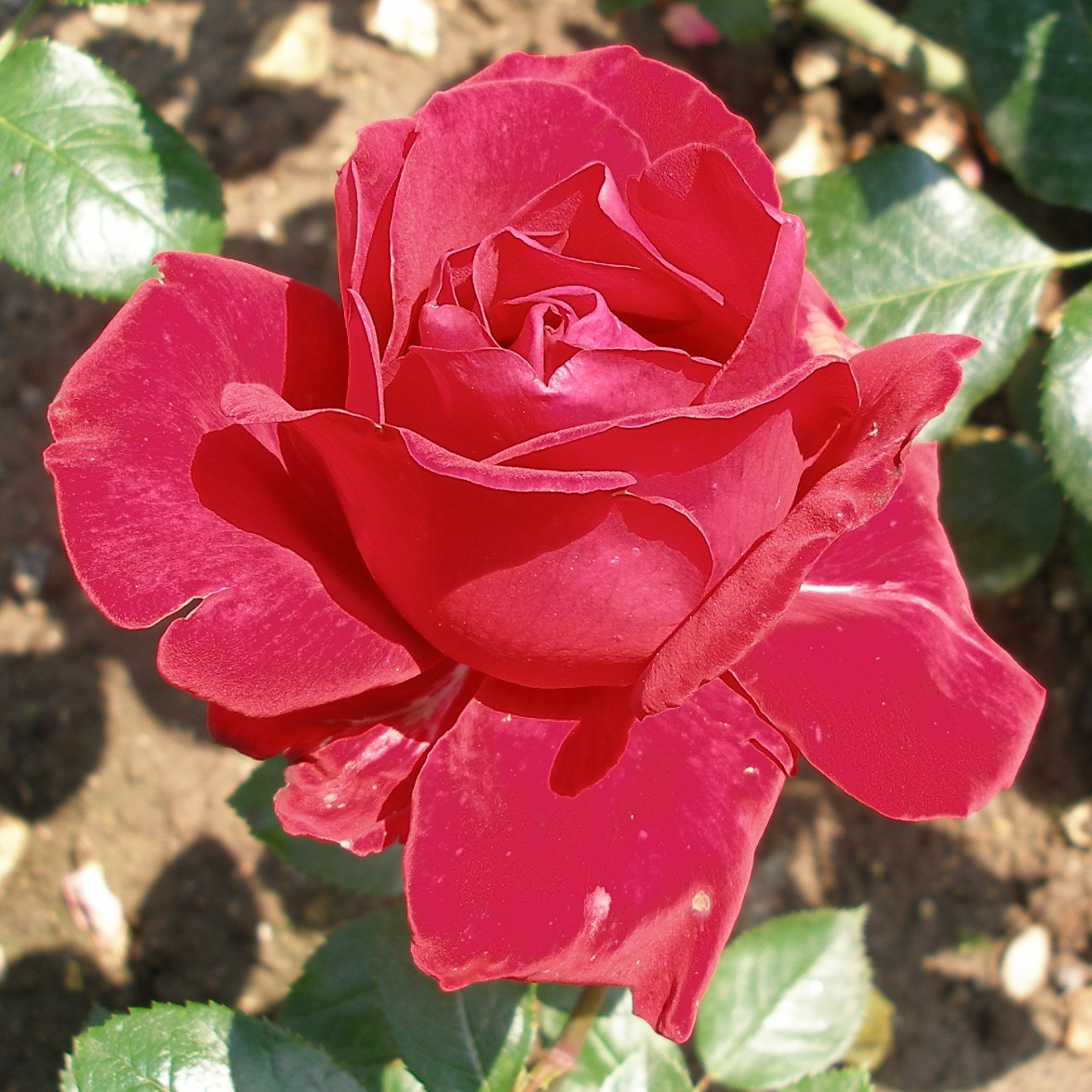 Rose Ingrid Bergman (R) Poulman (Obt. Poulsen Edit. NIRP International) roseraie du jardin des Plantes de Paris (Vème)